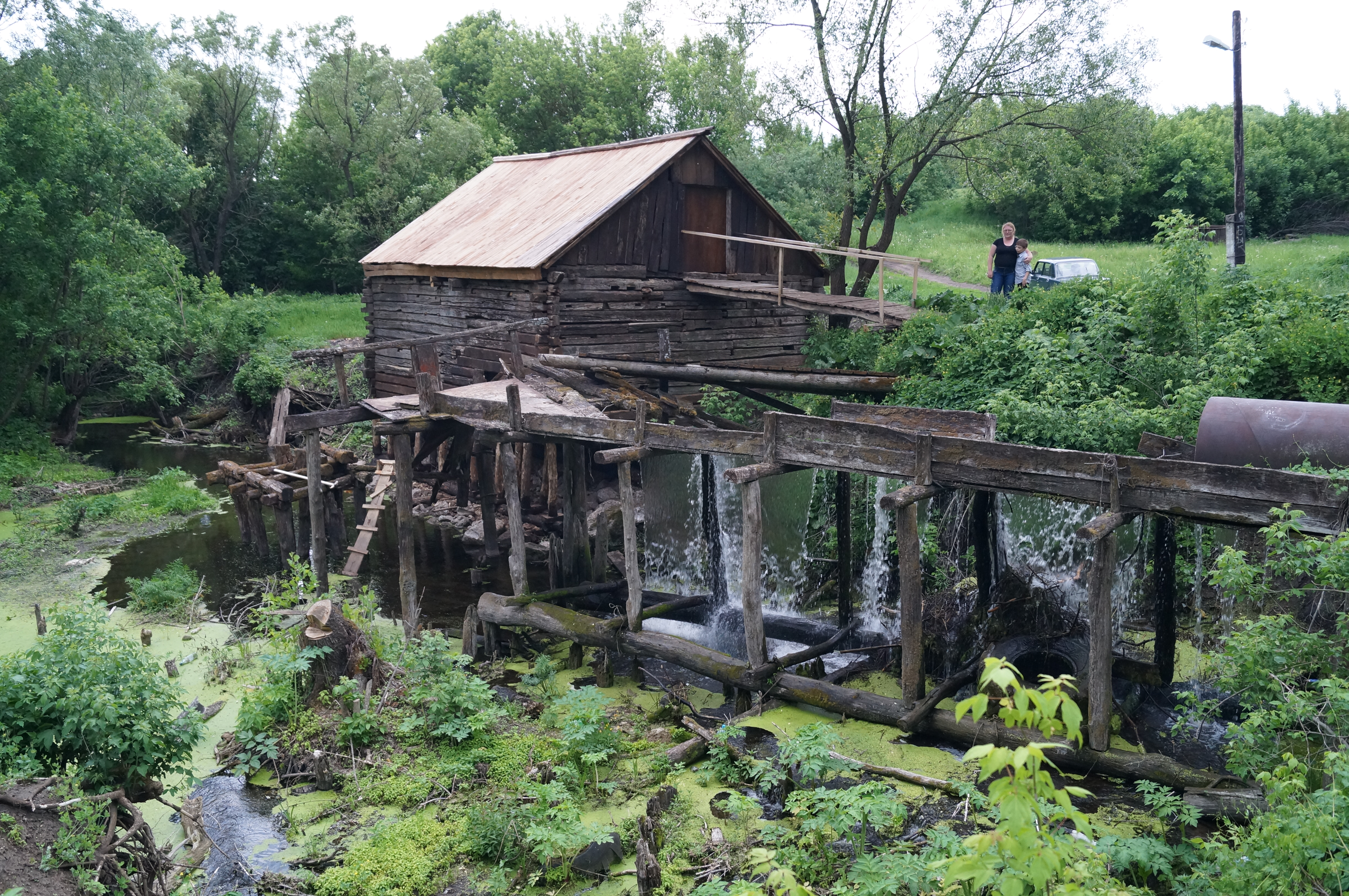 Водяная мельница с. Красниково Пристенского района Курской области, построена в 1861 году. Работала до 2006 г.